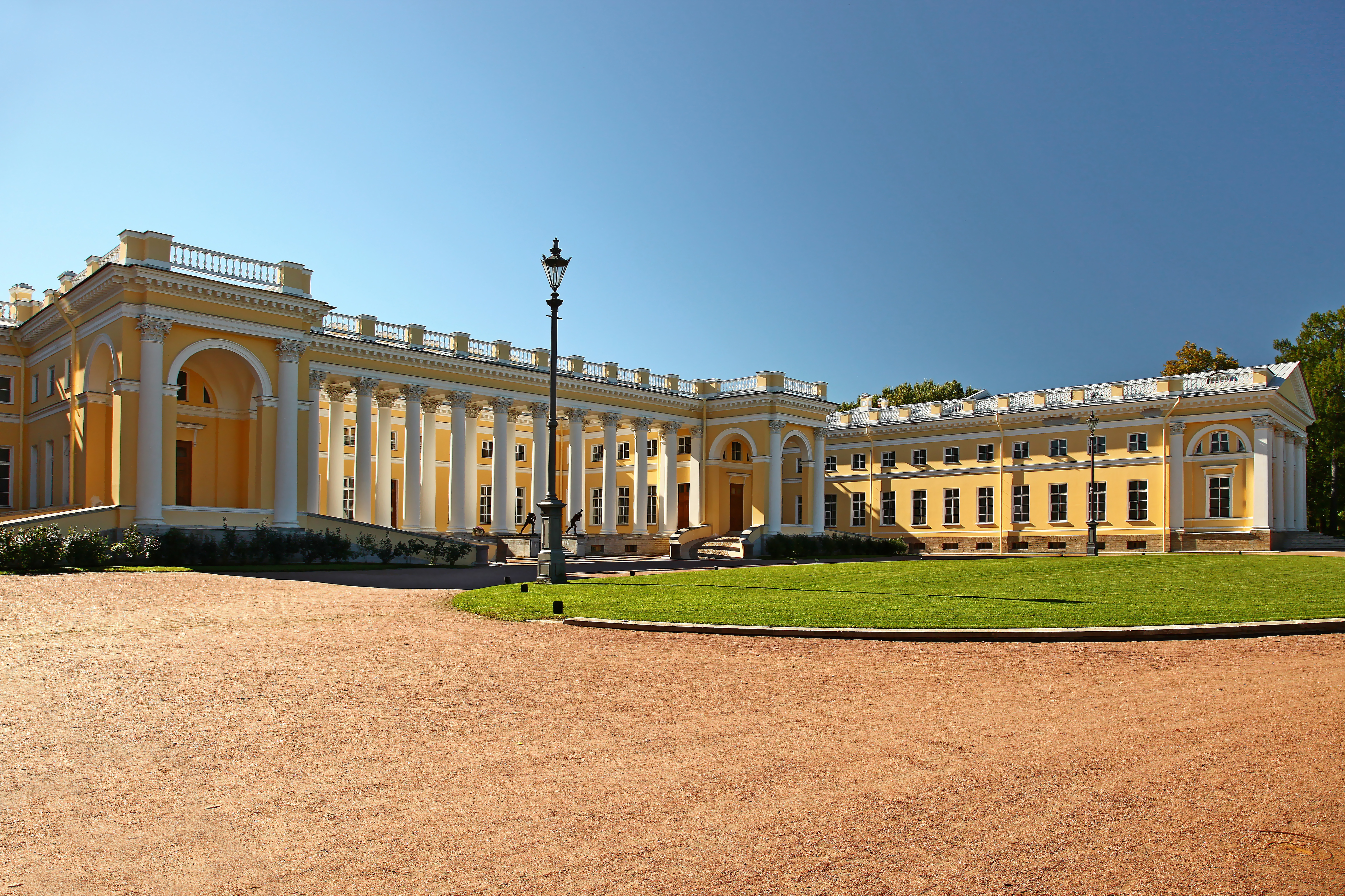 Государственный художественно-архитектурный дворцово-парковый музей-заповедник 'Царское Село': Пушкин, Пушкинский район, Санкт-Петербург This image is related to the protected area of Russia number 7800008